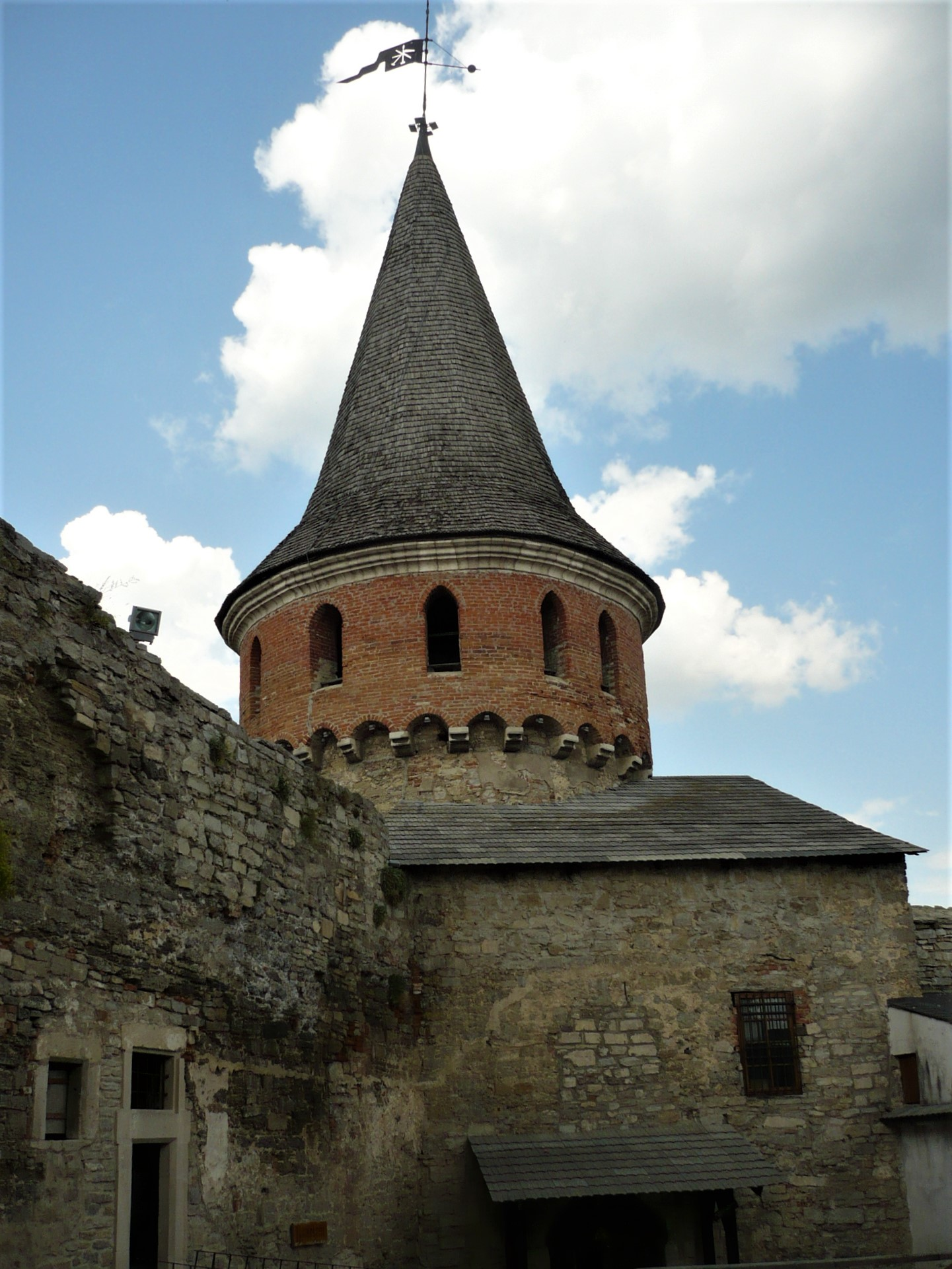 Zamek w Kamiencu Podolskim. Baszta